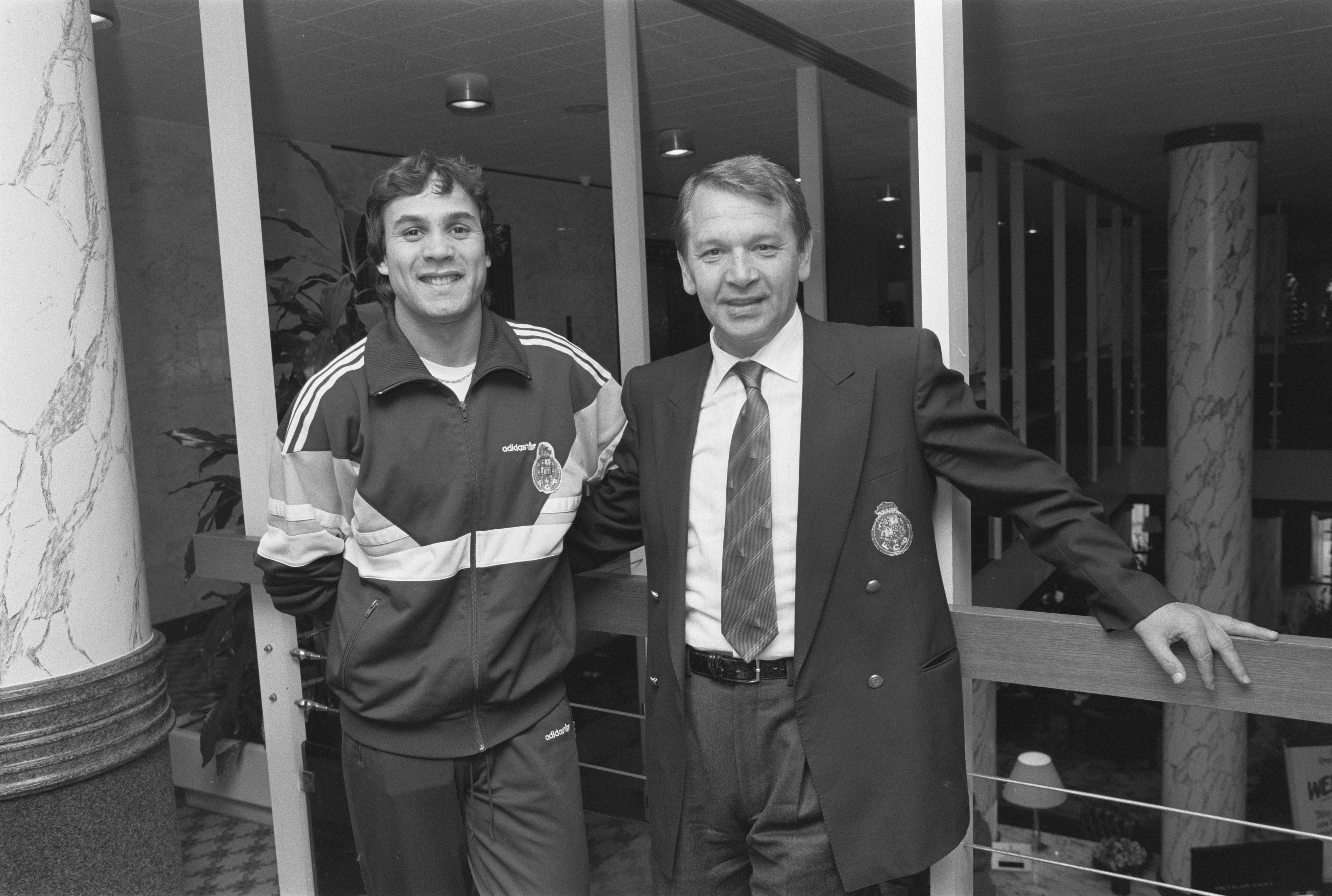 Collectie / Archief : Fotocollectie Anefo Reportage / Serie : [ onbekend ] Beschrijving : FC Porto (in verband met wedstrijd om Super Cup tegen Ajax); speler Madjer (l) en trainer Ivic in het hotel Datum : 23 november 1987 Trefwoorden : spelers, sport, trainers, voetbal Persoonsnaam : Fc Porto, Ivic Instellingsnaam : AJAX Fotograaf : Molendijk, Bart / Anefo Auteursrechthebbende : Nationaal Archief Materiaalsoort : Negatief (zwart/wit) Nummer archiefinventaris : bekijk toegang 2.24.01.05 Bestanddeelnummer : 934-1340